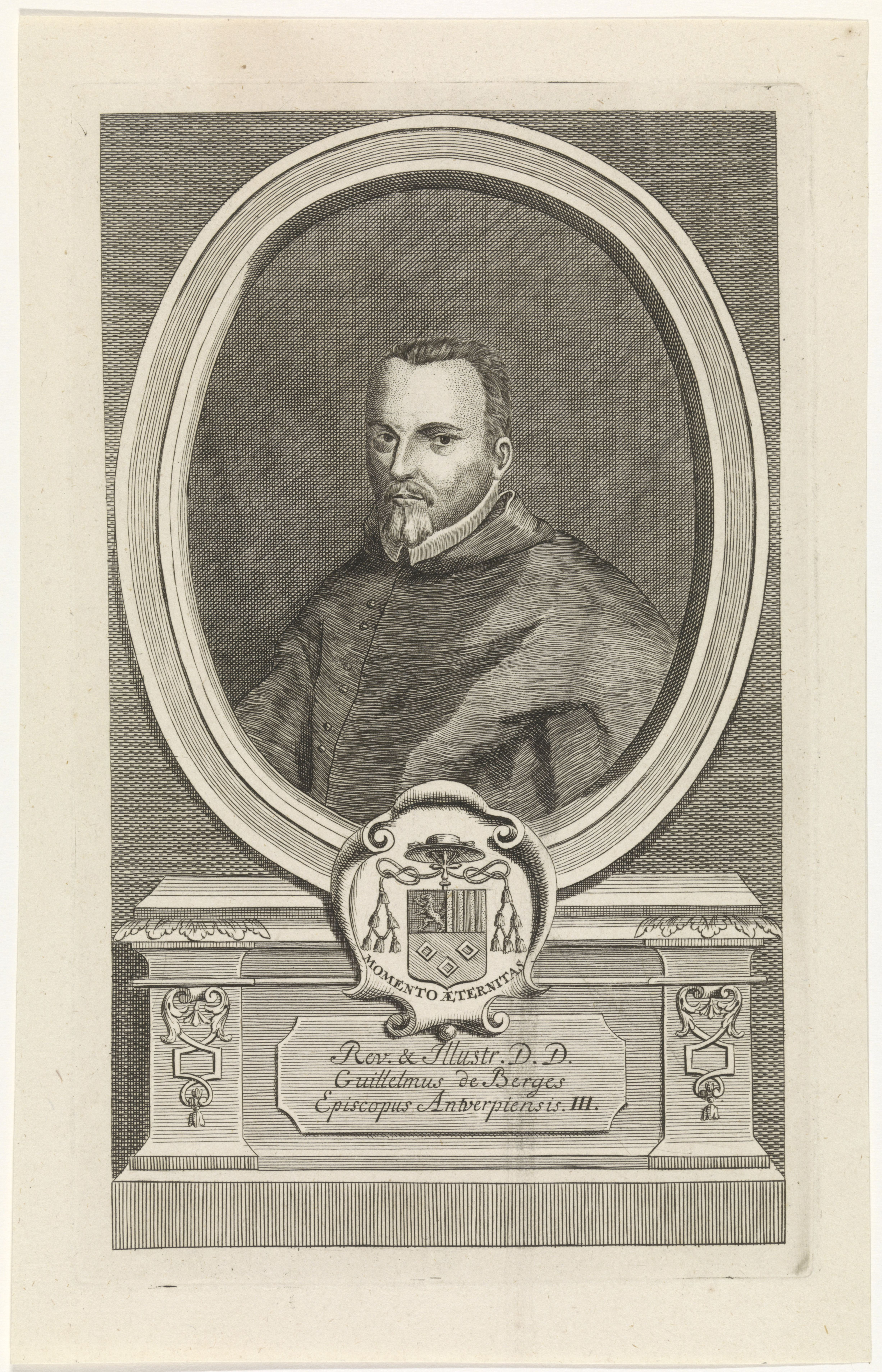 IdentificatieTitel(s): Portret van Willem de BerghesObjecttype: prent boekillustratie Objectnummer: RP-P-1912-755Opschriften / Merken: verzamelaarsmerk, verso, gestempeld: Lugt 2228Omschrijving: Busteportret van de bisschop Willem de Berghes. Het portret is gevat in een ovale omlijsting met het wapenschild van de geportretteerde en een motto in het Latijn. In een kader een drieregelig onderschrift in het Latijn.VervaardigingVervaardiger: prentmaker: Jan Baptist JongelinckPlaats vervaardiging: AntwerpenDatering: 1710 - 1725Fysieke kenmerken: ets en gravureMateriaal: papier Techniek: etsen / graveren (drukprocedé)Afmetingen: plaatrand: h 265 mm × b 163 mmToelichtingPrent gebruikt in: Jacques Le Roy, Groot kerkelijk tooneel des Hertogdoms van Brabant. 's Gravenhage: C. van Lom, 1727 / Jacques Le Roy, Le grand theatre sacré du duché de Brabant. 's Gravenhage: G. Block, 1734.OnderwerpWie: Willem de BerghesVerwerving en rechtenCredit line: Schenking van de heer J.J. de Graaf, HaarlemVerwerving: schenking 1912Copyright: Publiek domein